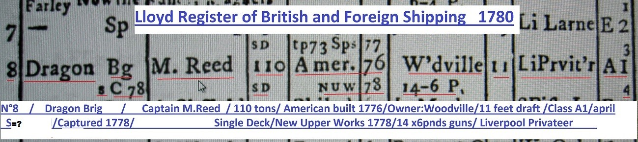 Description of the Dragon Privateer as appearing in the 1780 Lloyd's Register